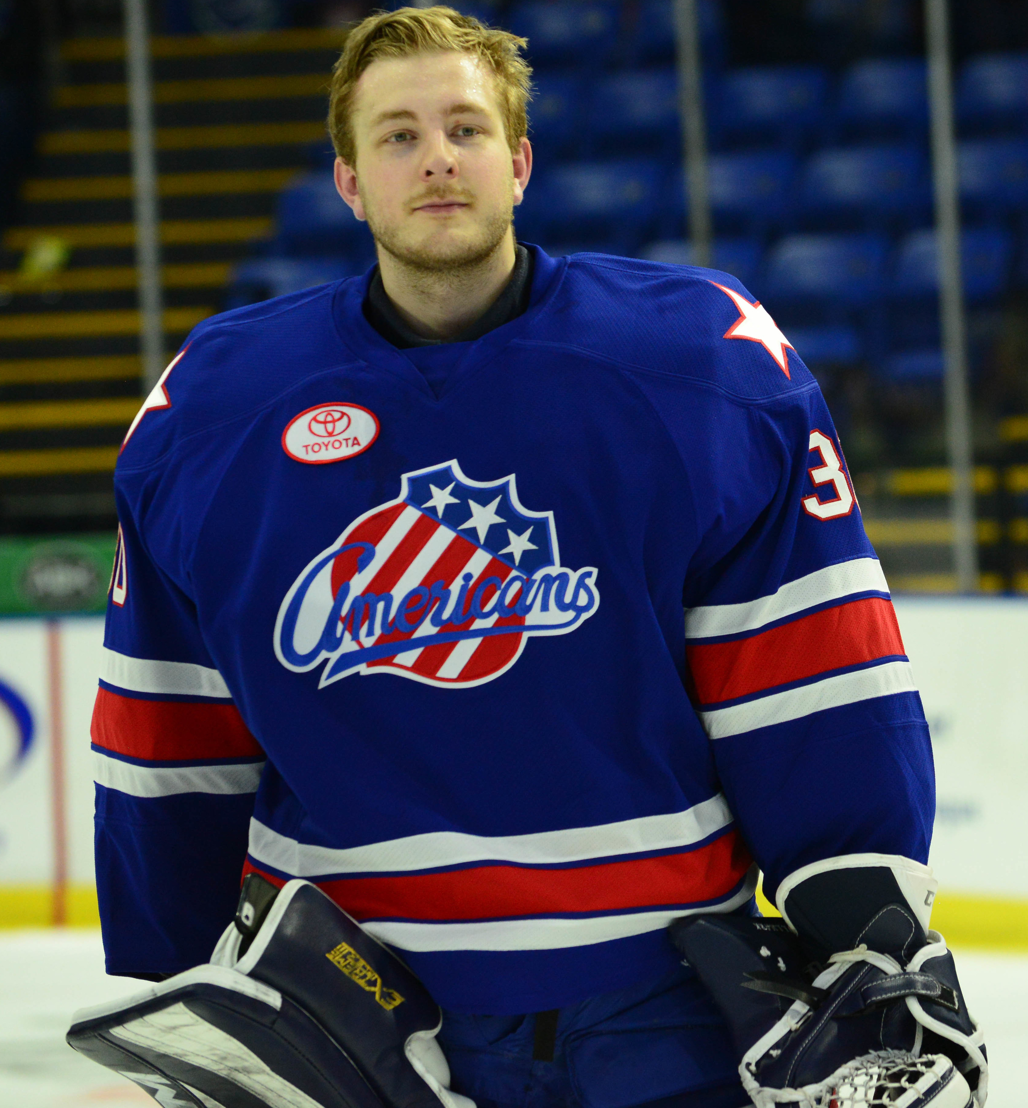 (Bryan Peck/ AHL)